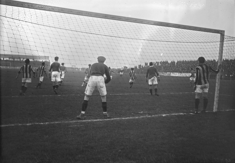 Match de football entre le Club français et l'Olympique de Paris au Stade Bergeyre en 1921.